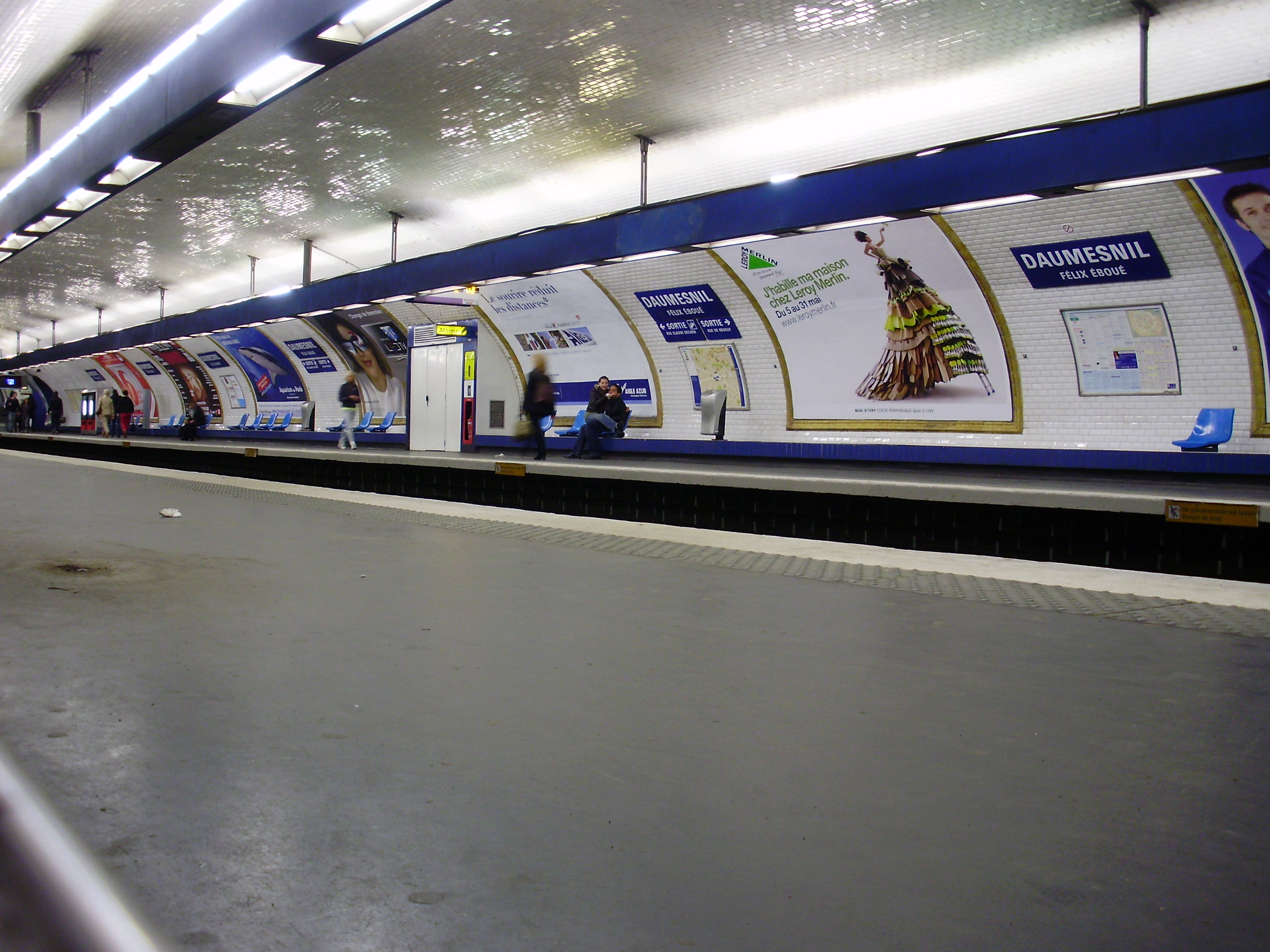 Quai (au second plan) vers Créteil - Préfecture (ligne 8) de la station « Daumesnil » du métro de Paris